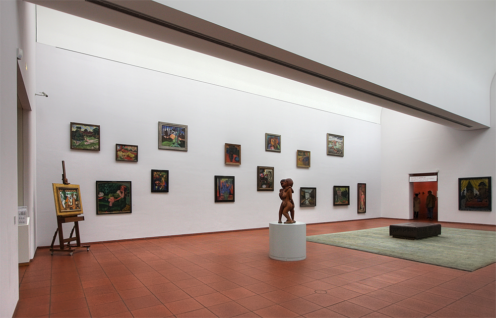 Ausstellungsraum der Sammlung Haubrich im Museum Ludwig, Köln